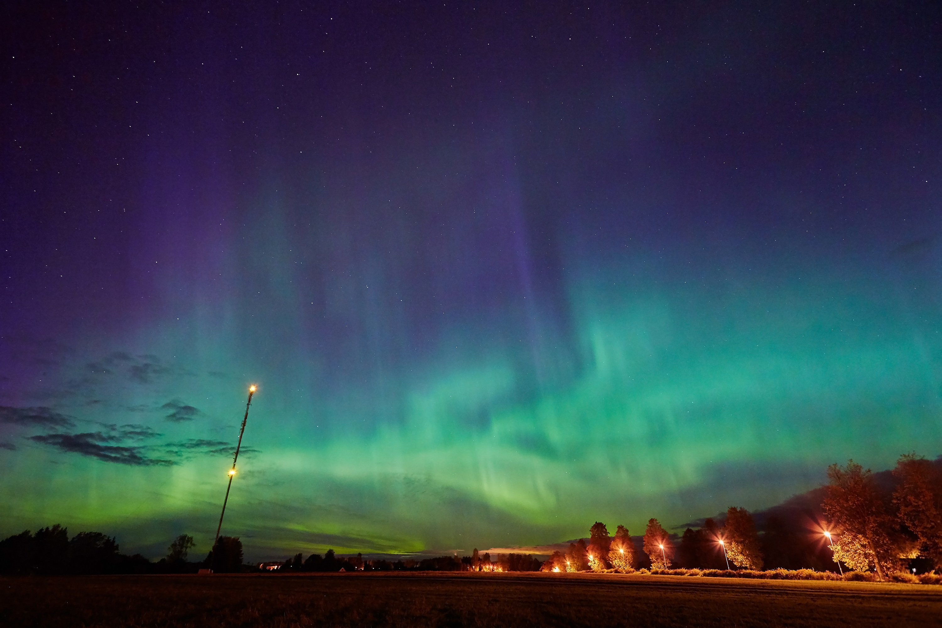 Virmalised Väimelas 7. oktoobril 2015. aastal